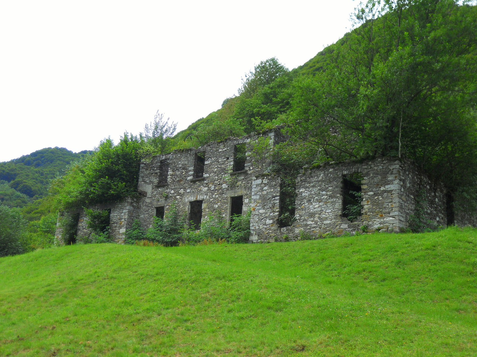 L'antica sede della Sutermeister a Pogallo